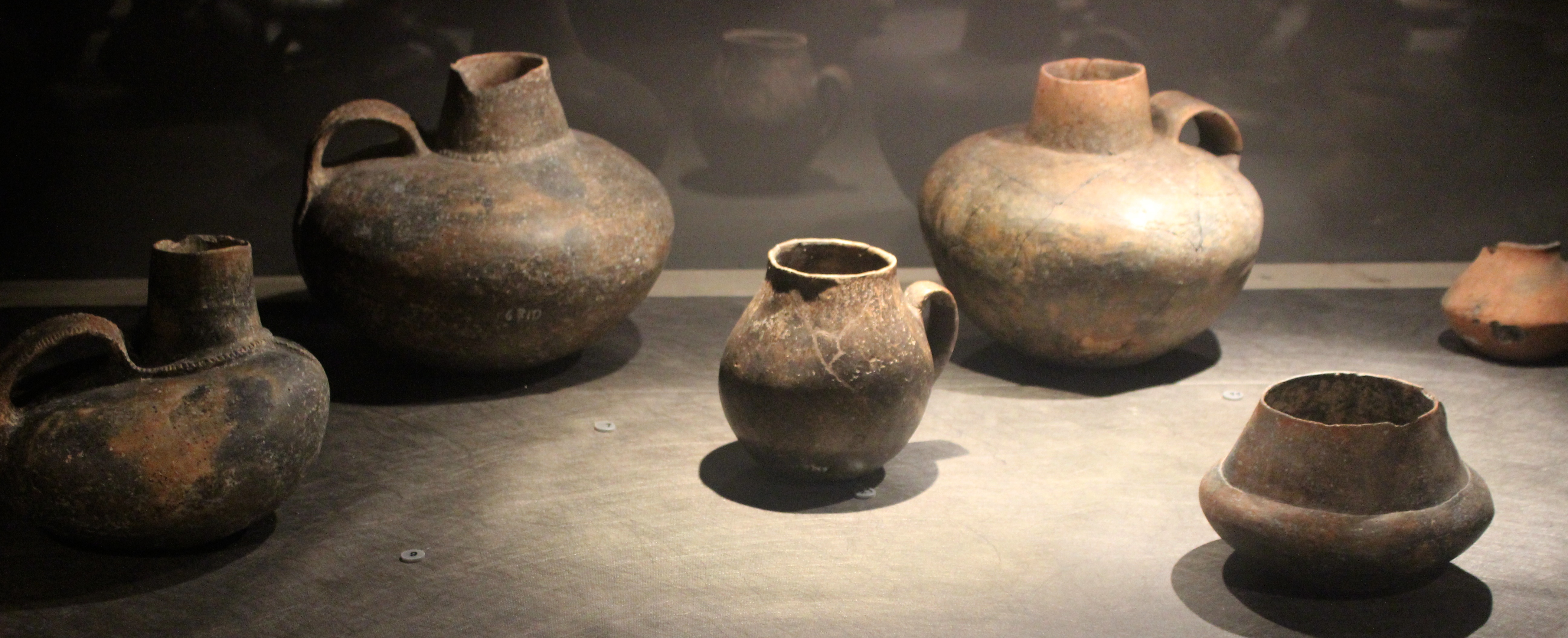 Paestum. Museo Archeologico Nazionale. Cerámica de la cultura del Gaudo.